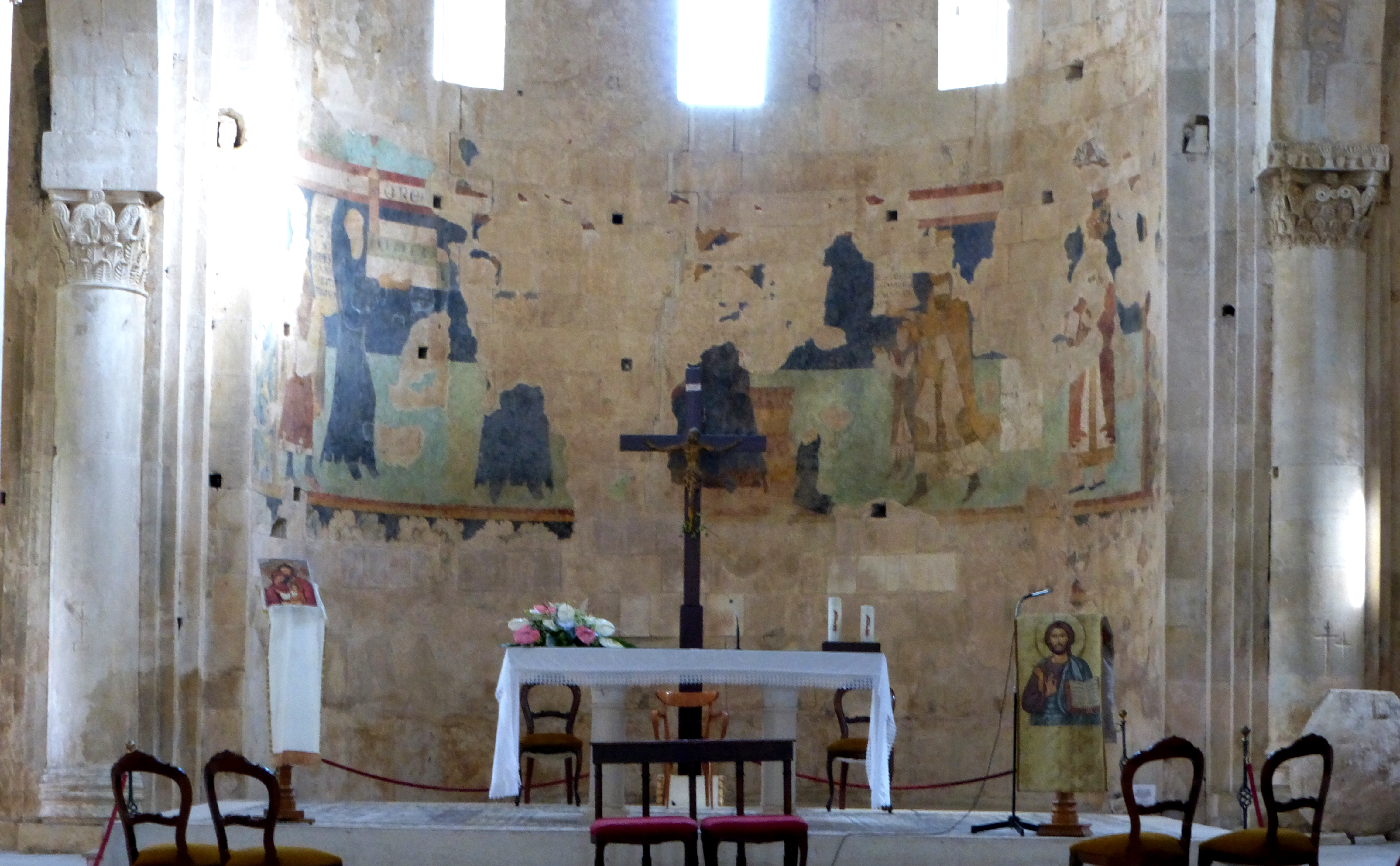 Affresco nella chiesa di San Liberatore a Majella, Serramonacesca, Pescara.